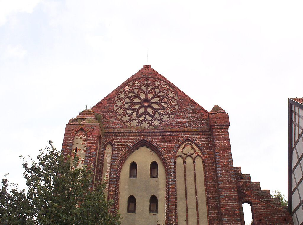 Kołbacz - rozeta